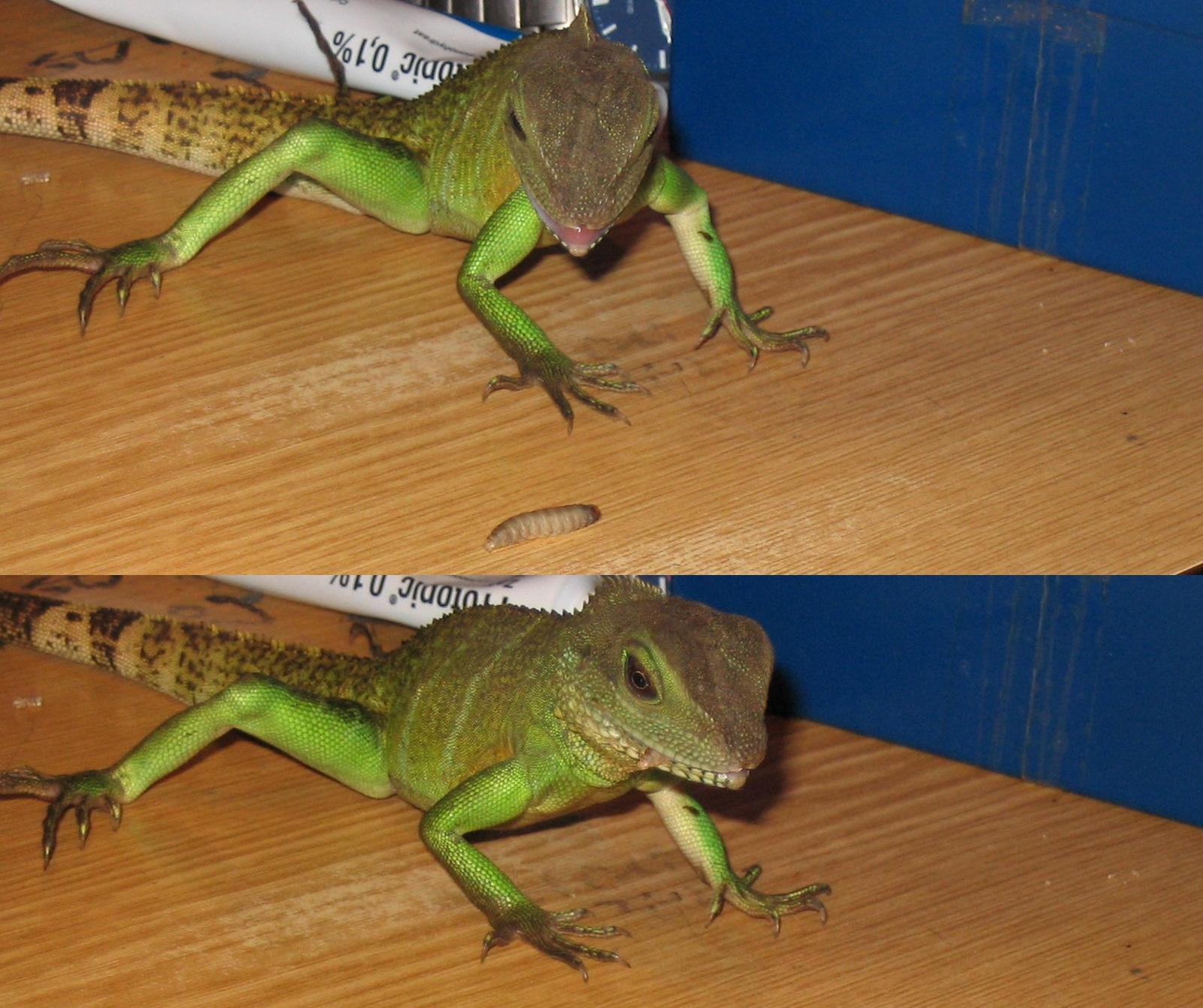 Eigen foto van een wateragame op mijn bureau.